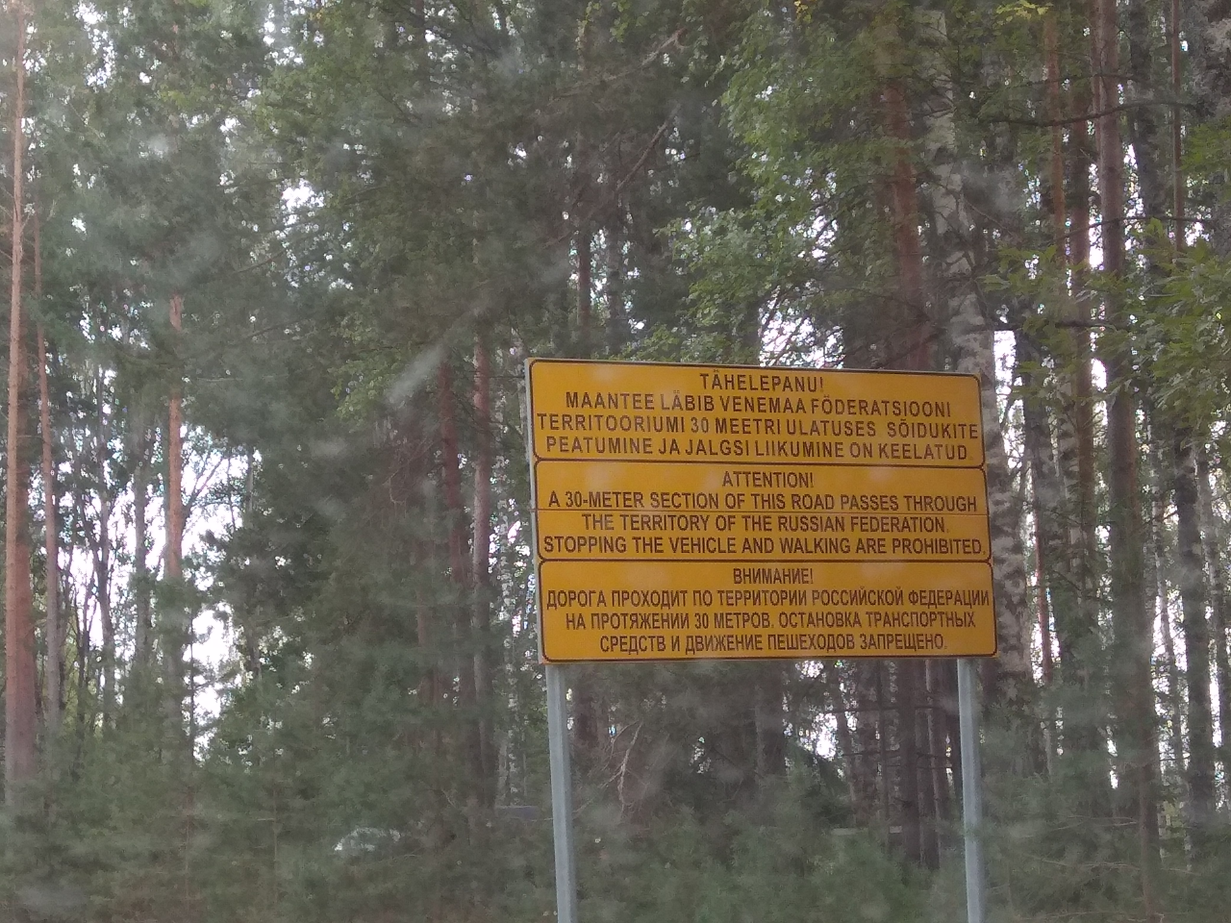 Saatse Boot signal